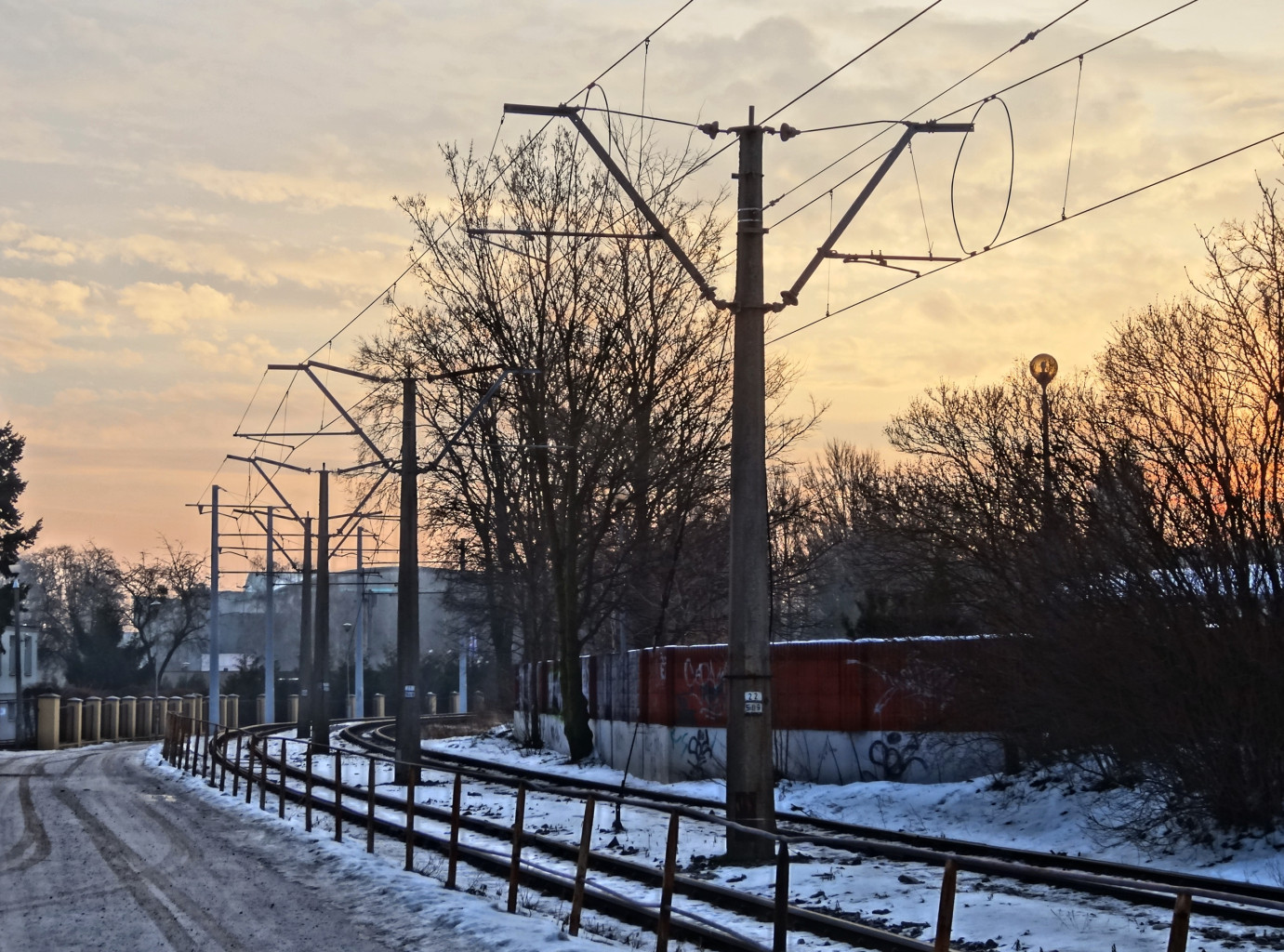 Linia tramwajowa "Brda" na osiedlu Babia Wieś w Bydgoszczy